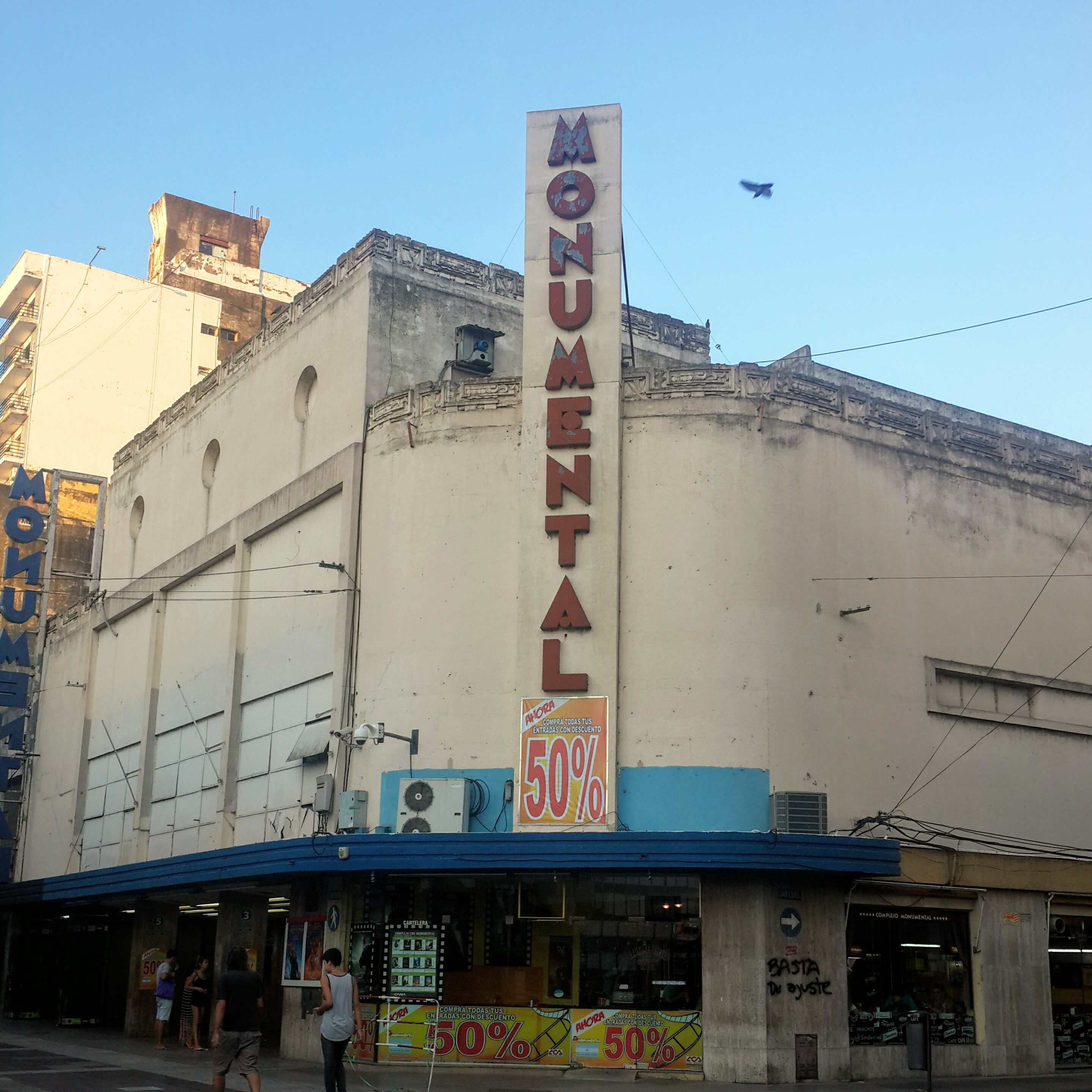 Cine Monumental de Rosario, uno de los cines más antiguos de la ciudad de Rosario, provincia de Santa fe, Argentina.